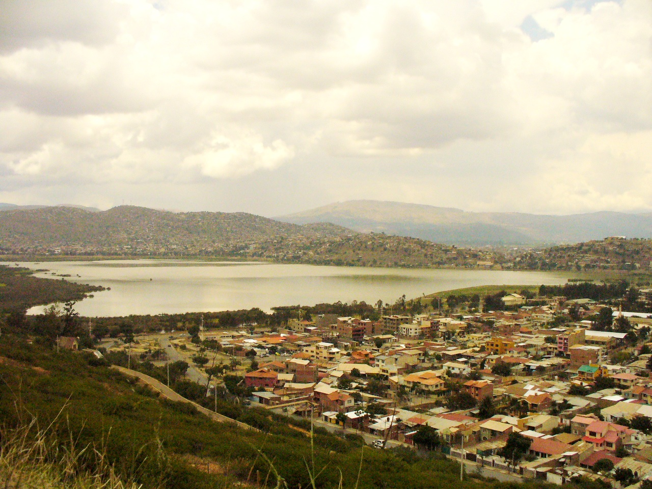 Panoramica desde el Cristo de la Concordia. La ciudad con mas desarrollo de Bolivia, bonita pero no la mas bonita. La gente linda como toda la boliviana.